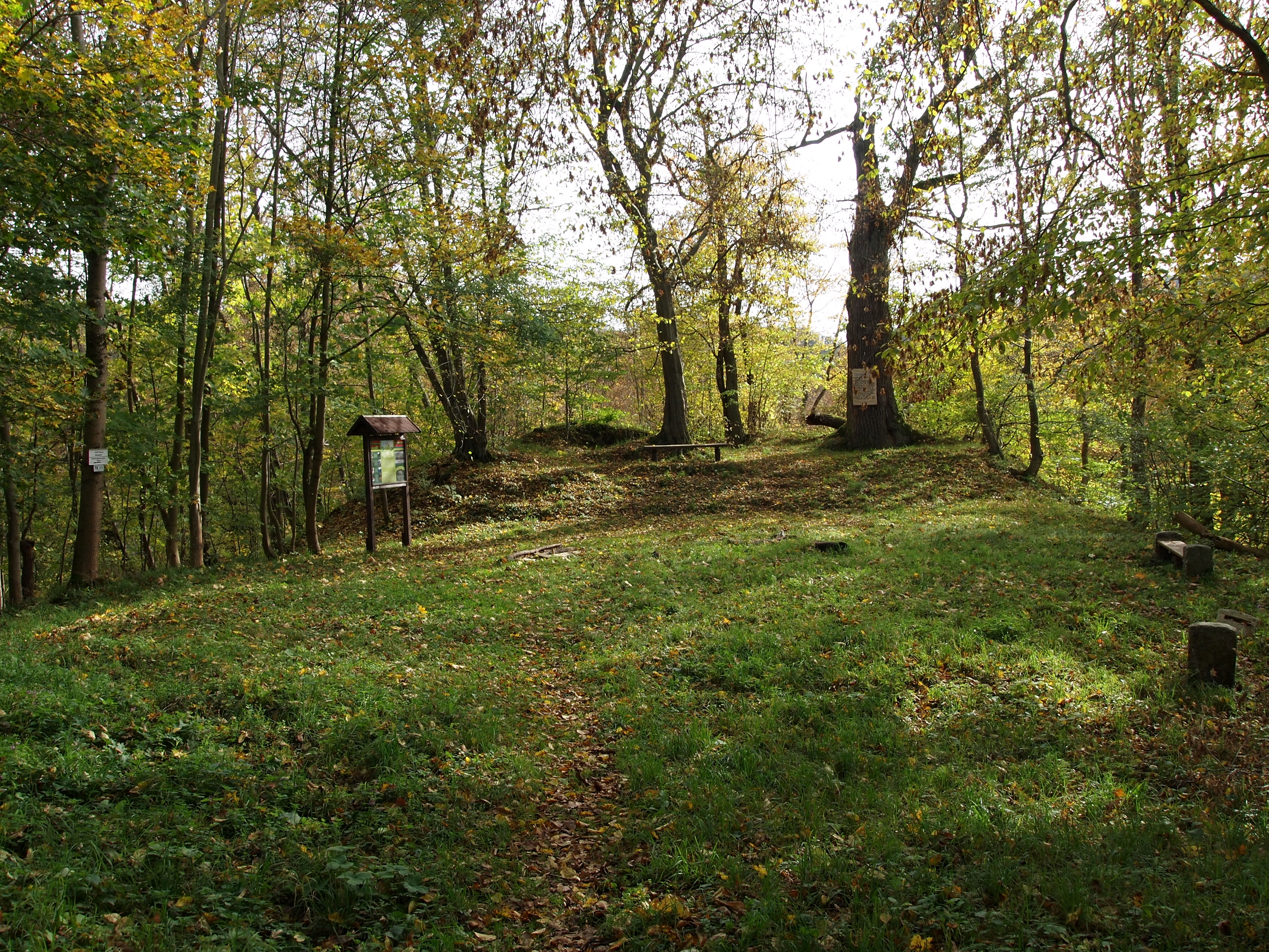 Treseburg (Stadt Thale, Landkreis Harz, Sachsen-Anhalt) Alter Burgplatz (im Dorfwald innerhalb der Bodeschleife); von ca. 965 bis ca. 1525 befand sich an diesem Ort die Treseburg